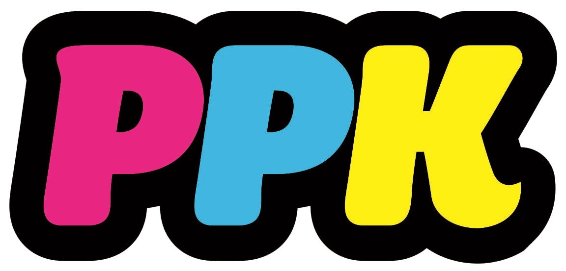 Peruanos Por el Kambio